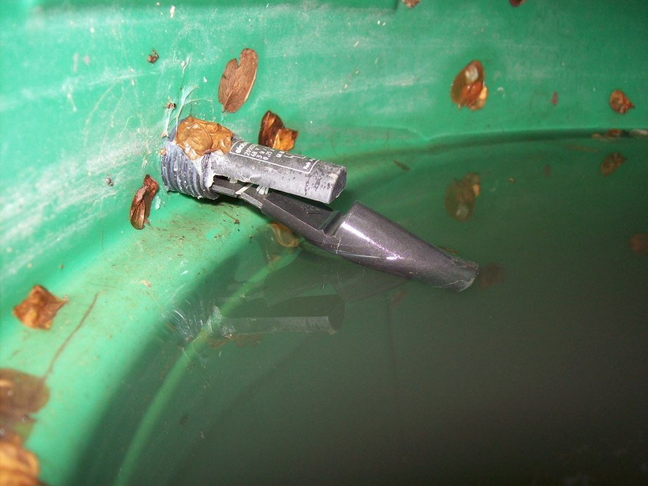 Ein Schwimmerschalter (Klapp-Version) in einem Regenfass.